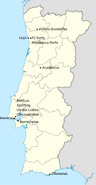 carte des clubs participants du championnat du portugal de football de premiere division 1941-1942